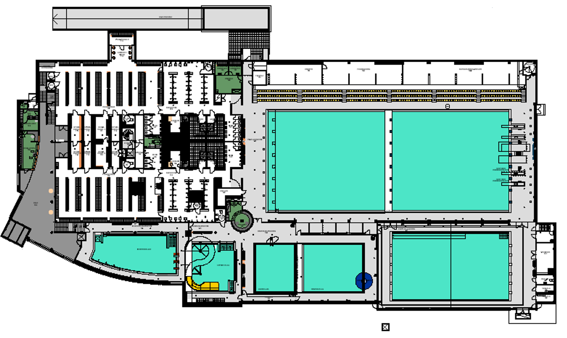 Oulun Uimahallin pohjakuva vuoden 2002 remontin jälkeen